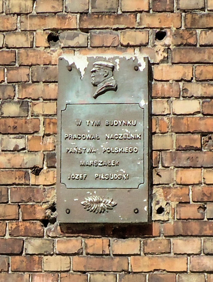 Tablica pamiątkowa na budynku nr 2 kompleksu koszarowego 36 Pułku Piechoty Legii Akademickiej przy ul. 11 Listopada w Warszawie (stan w dniu 14 sierpnia 2011)